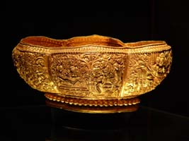 Bokor